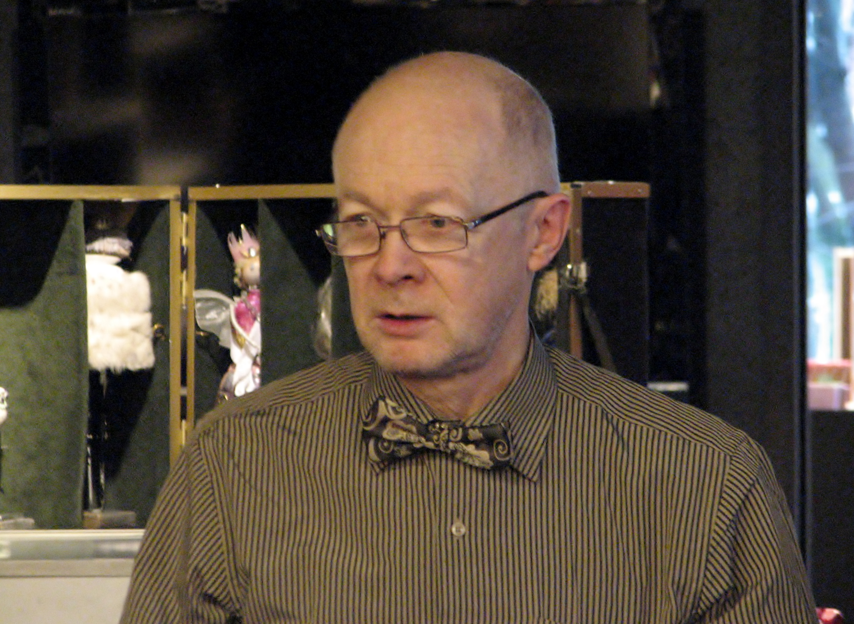 Heino Seljamaa Solarise keskuses Apollo lastehommikul